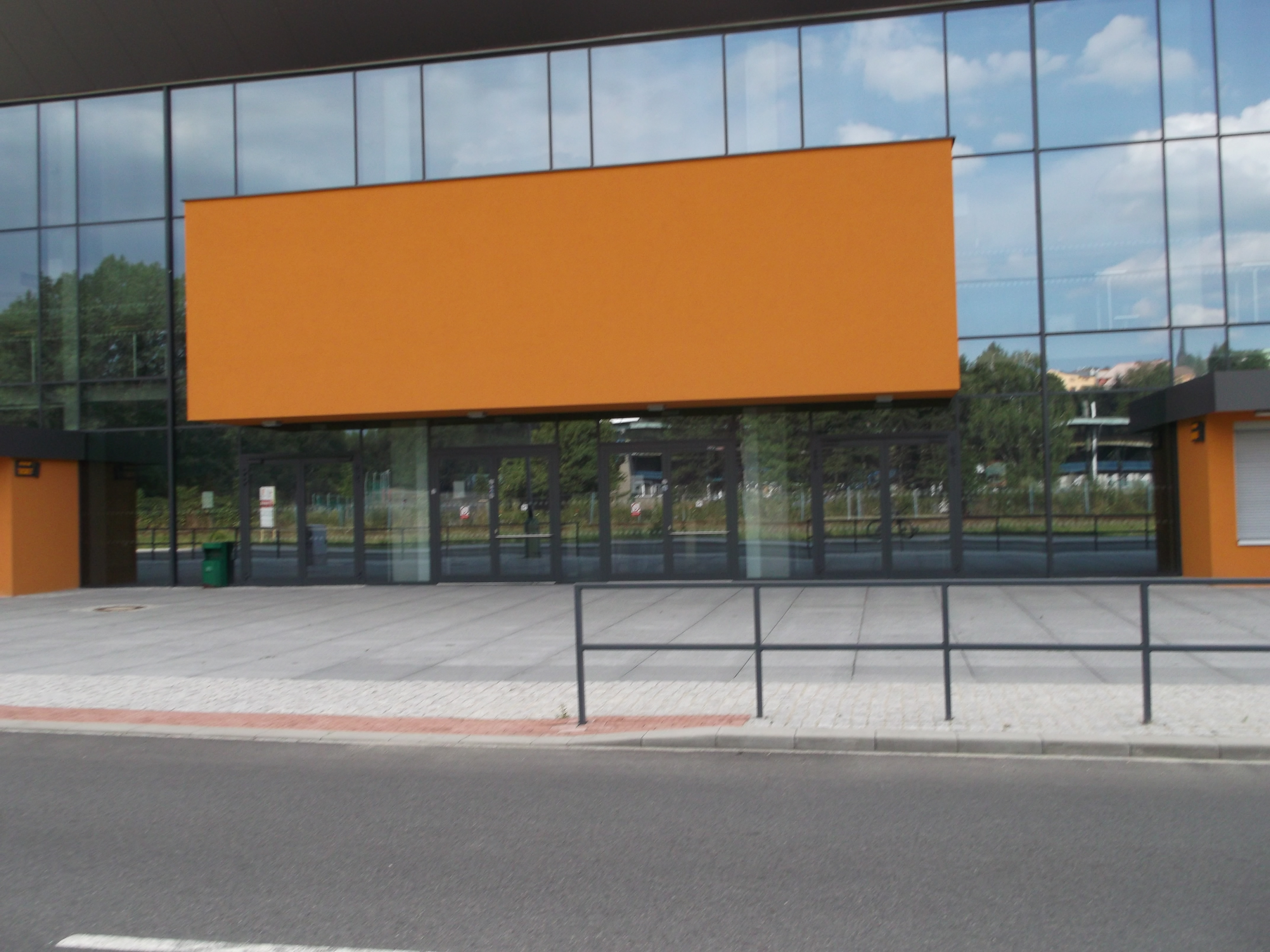 Hala Polárka, vchod